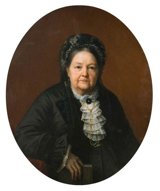 Вера Ивановна Анненкова, урож. Бухарина (1813-1902)